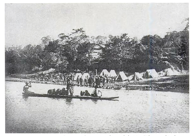 Acampamento às margens do rio Paranaíba da Comissão Exploradora do Planalto Central do Brasil, para delimitação do local de Brasília